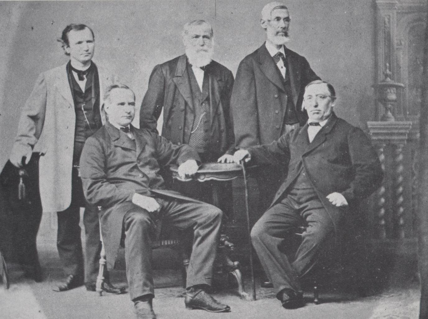 Johann Baptist Benz, Komponist und Domorganist Speyer, hinten mittig, mit weißem Vollbart